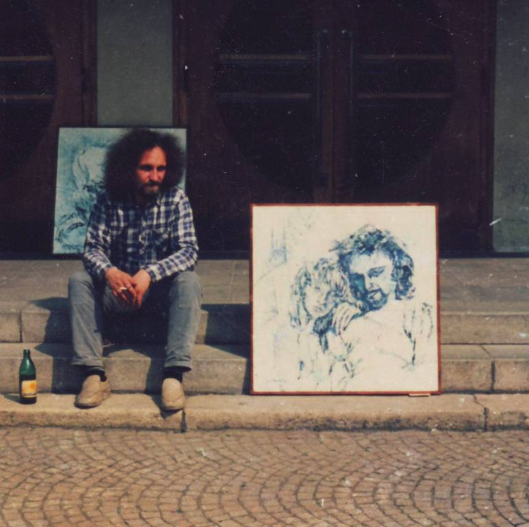 Jiří Meitner před Roškotovým divadlem v Ústí nad Orlicí